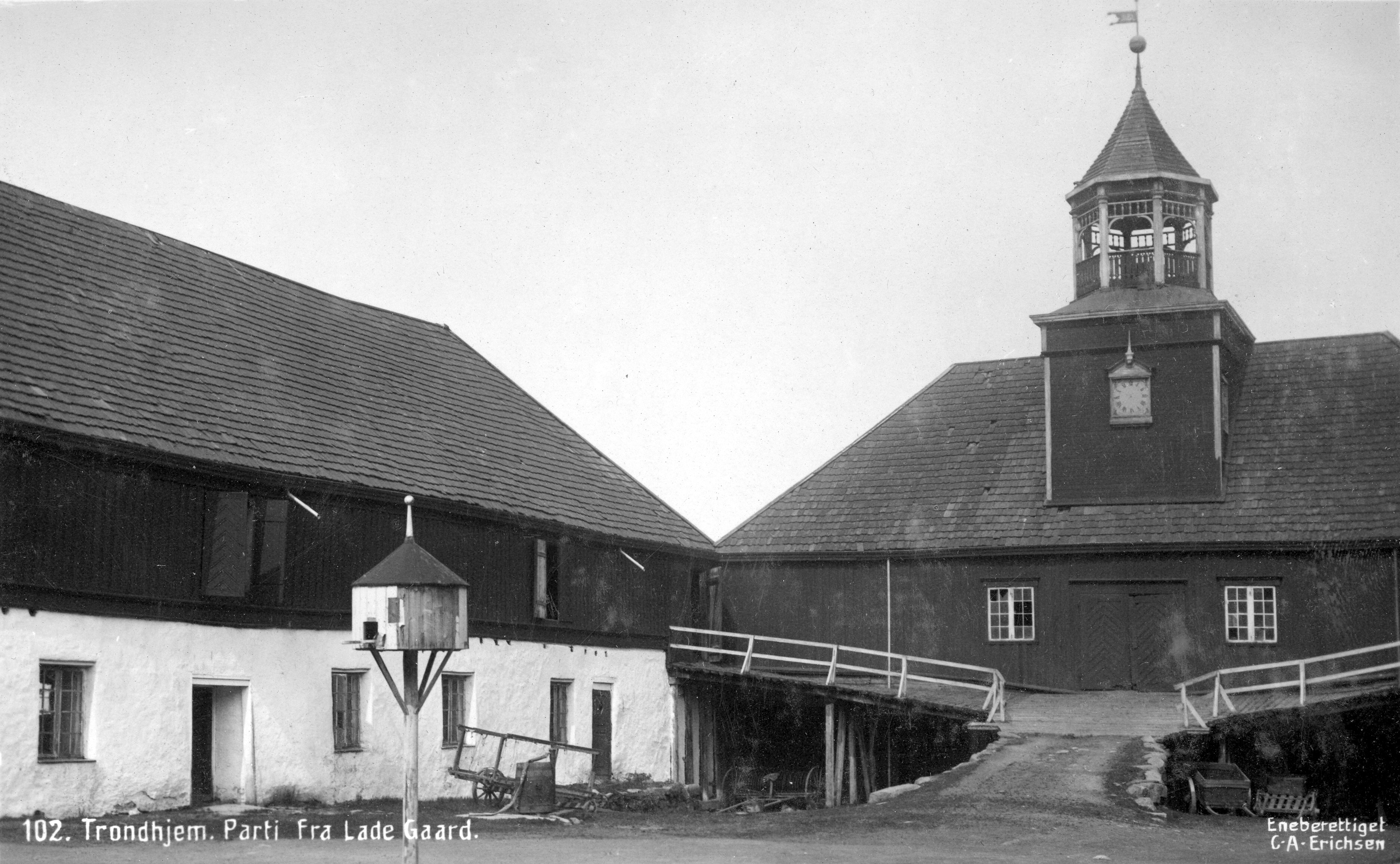 Format: Postkort. År: Tidlig 1900-tall, ca. 1910 - 1915. Om fotografen: ERICHSEN, C. A. - Drøbak og Bodø ca. 1910. Ett av hans bilder datert 1910 er med i Drøbakboken, og han har fotografert landskaper og brevkort i Bodø omtrent samtidig. Hentet fra Bonge, Susanne: Eldre norske fotografer. Fotografer og amatørfotografer i Norge frem til 1920 (Universitetsbiblioteket i Bergen)